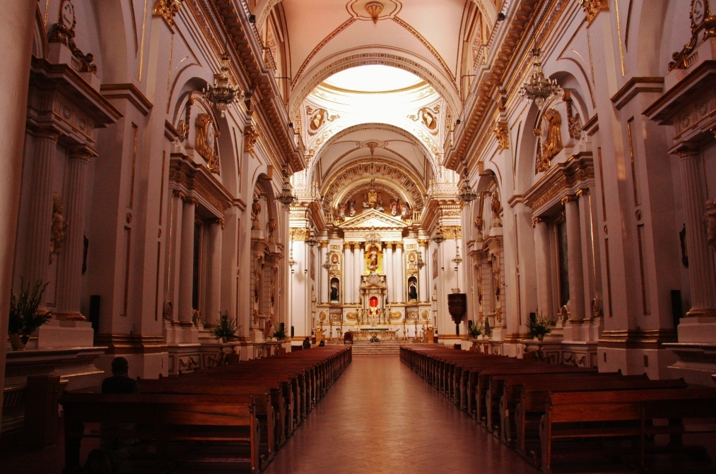 Templo de la Virgen del Carmen, Celaya, Guanajuato, México